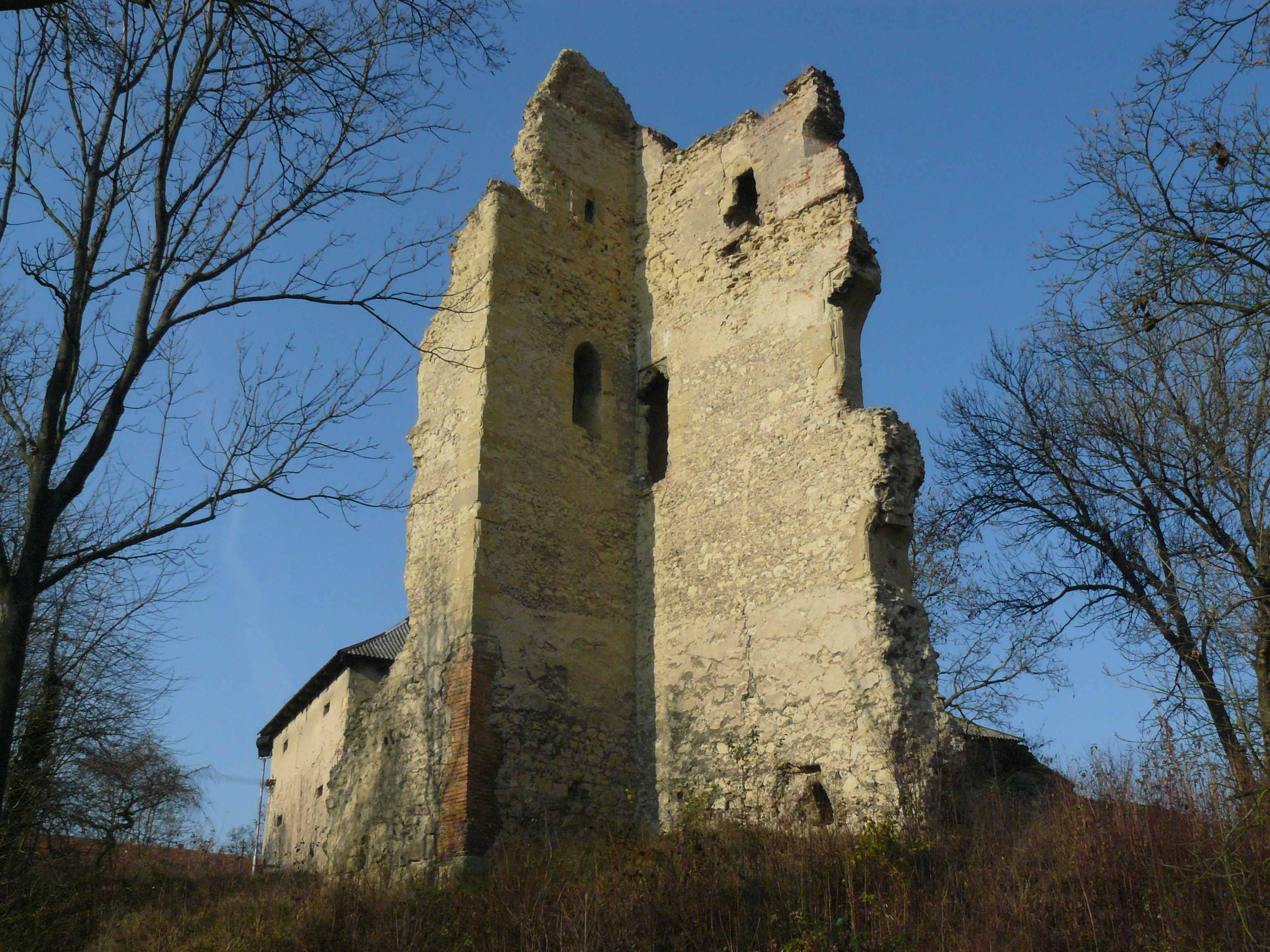 Hrad Dražice - kaple